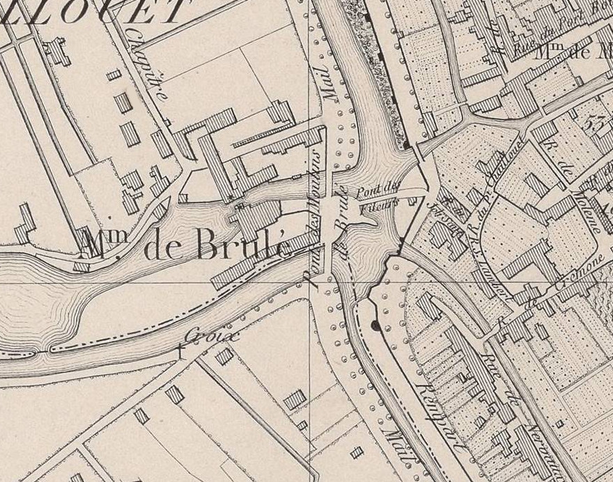 Plan_du moulin_brulé.